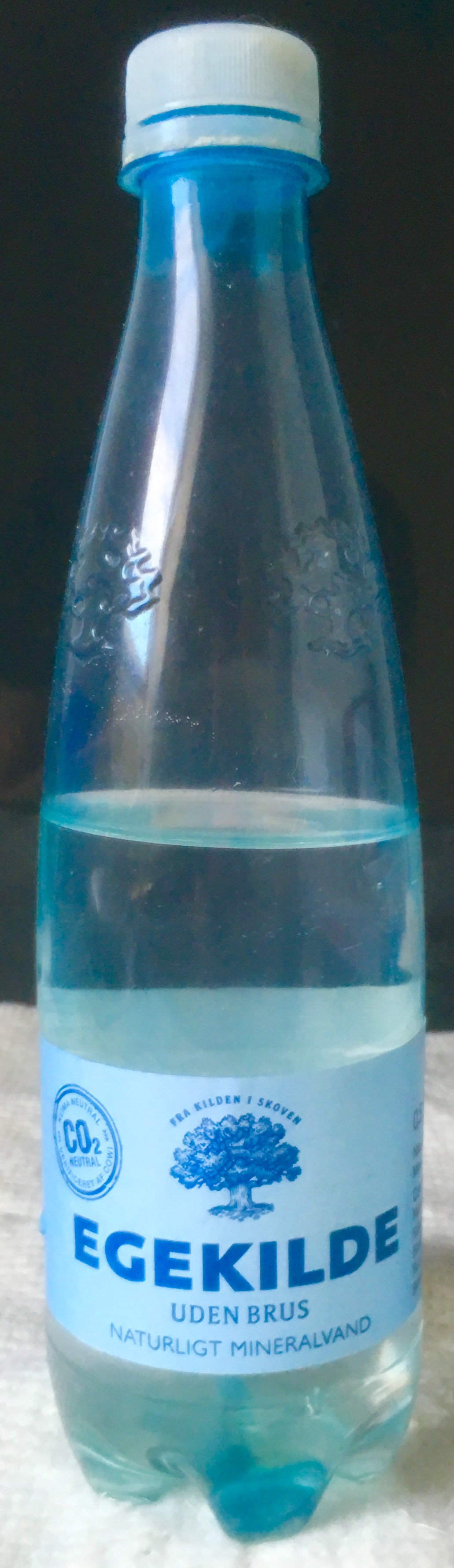 1/2 liter Egekilde mineralvand